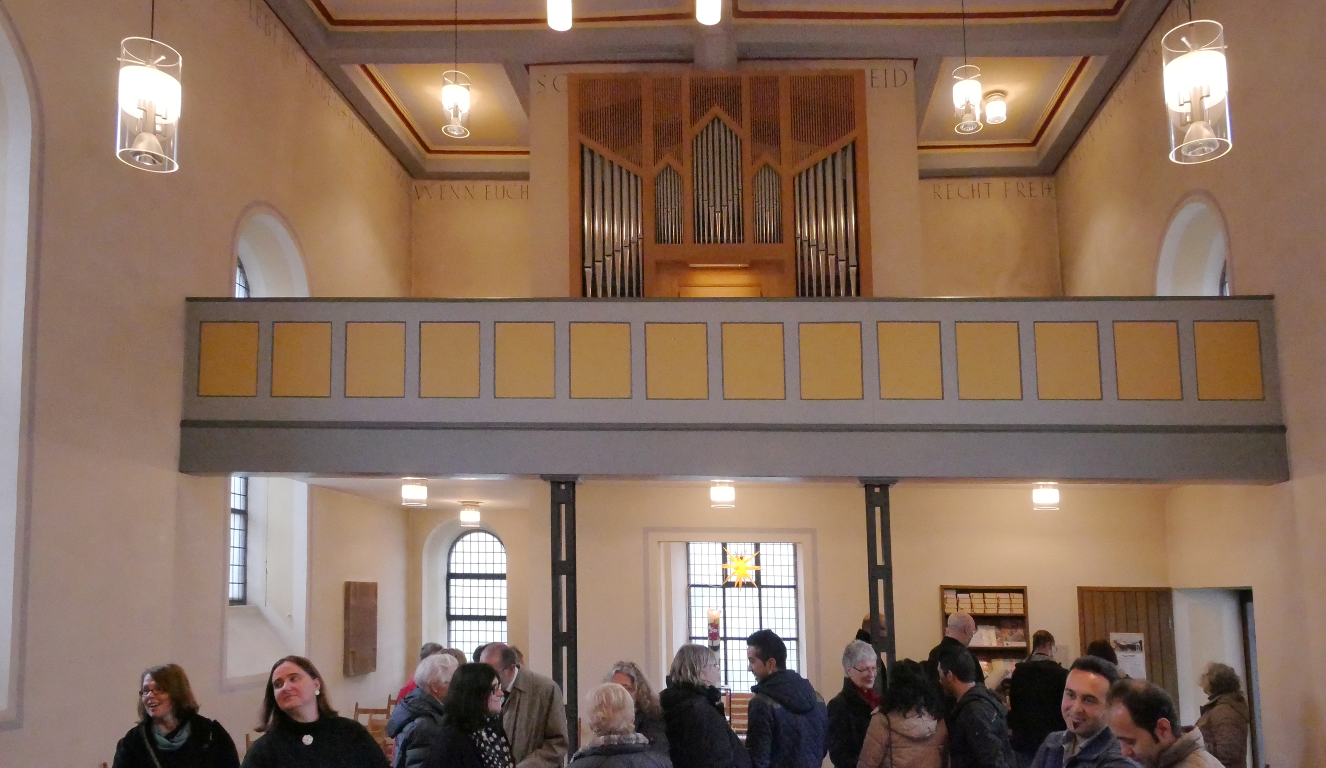 Evangelische Kirche Hermeskeil - Empore und Orgel